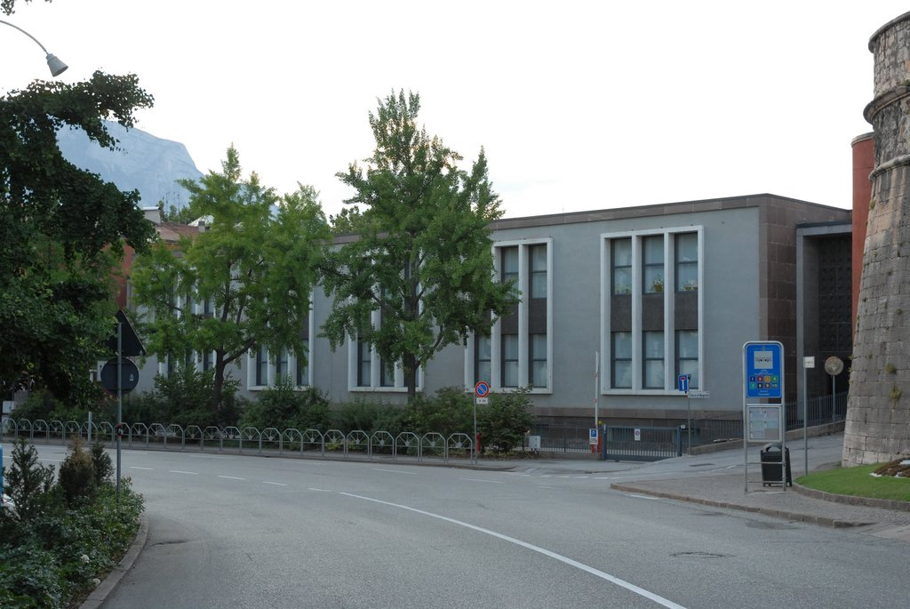 Depicted place: Trento Raffaello Sanzio